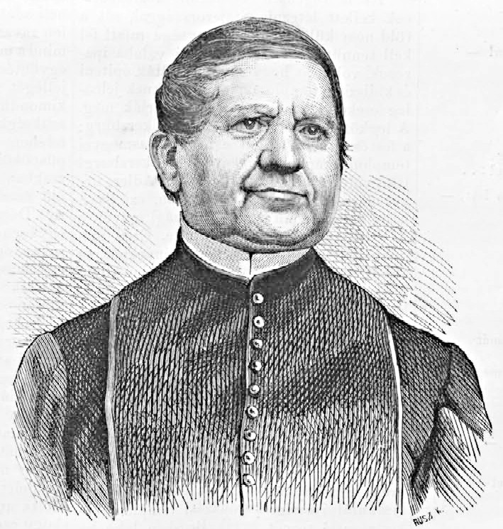 Jedlik Ányos (1800–1895) természettudós, feltaláló portréja. Rusz Károly metszete